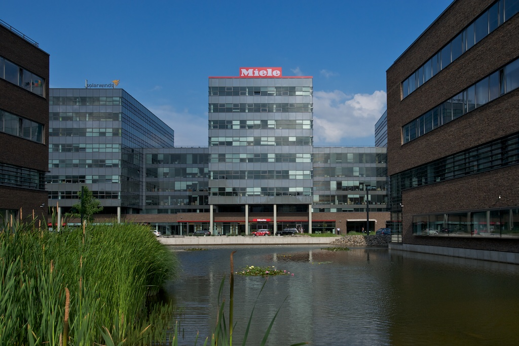 Spielberk Office Center Holandská 4 639 00 Brno Česká republika